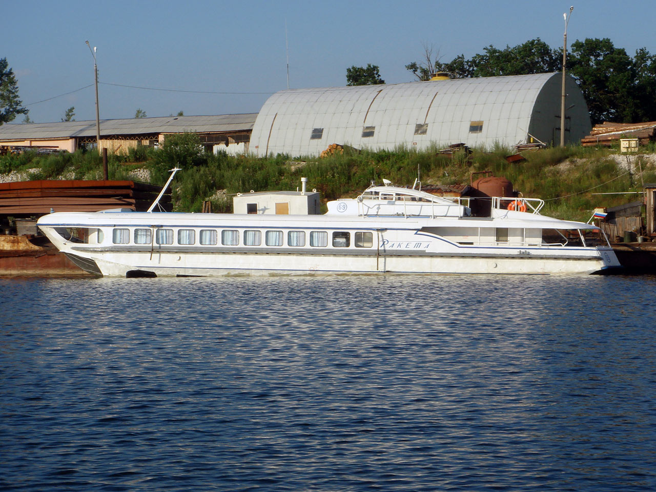 «Ракета-69» на приколе в городе Боре.